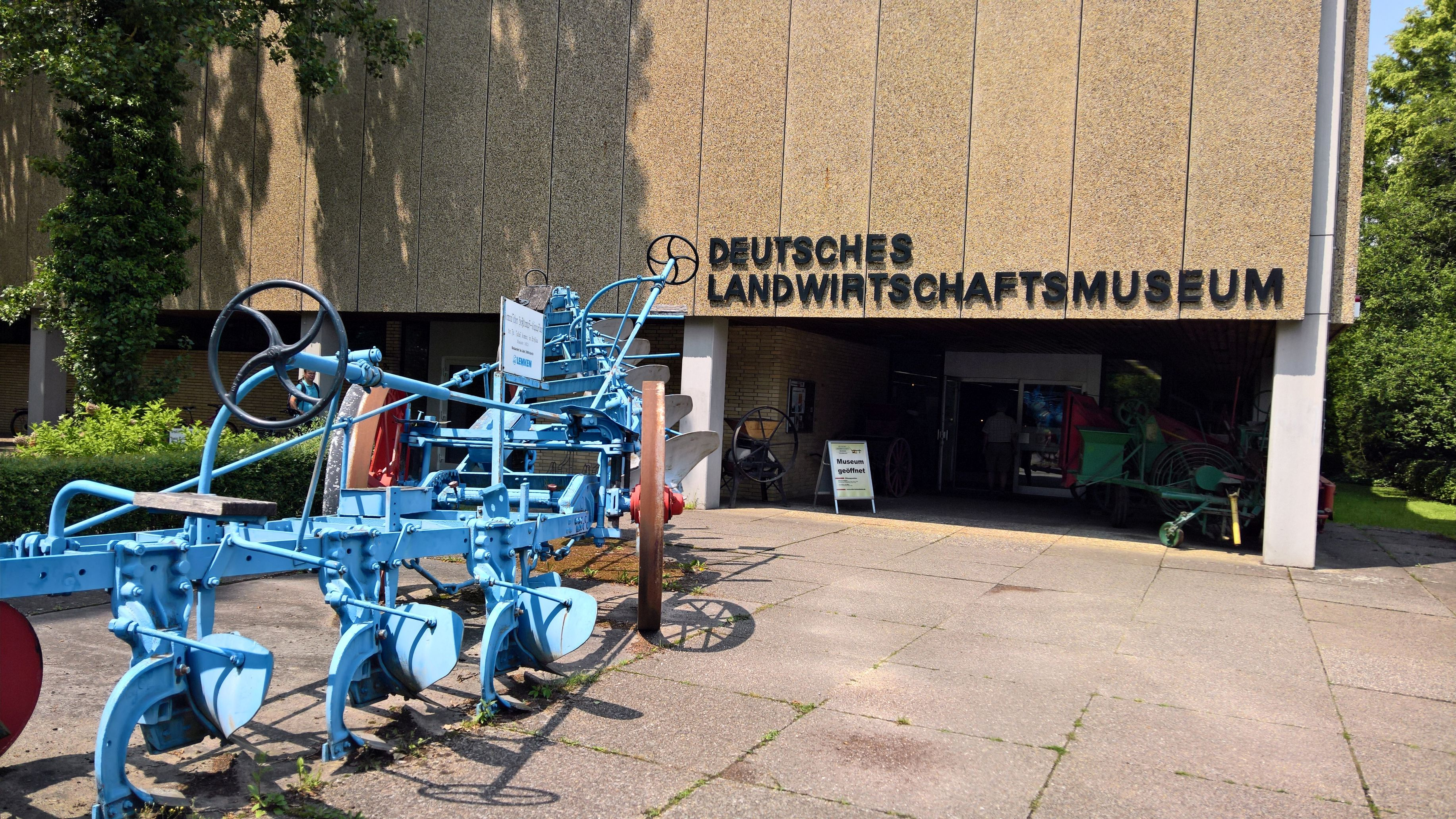 Bilder aus dem Deutsches Landwirtschaftsmuseum in Hohenheim (Stuttgart)